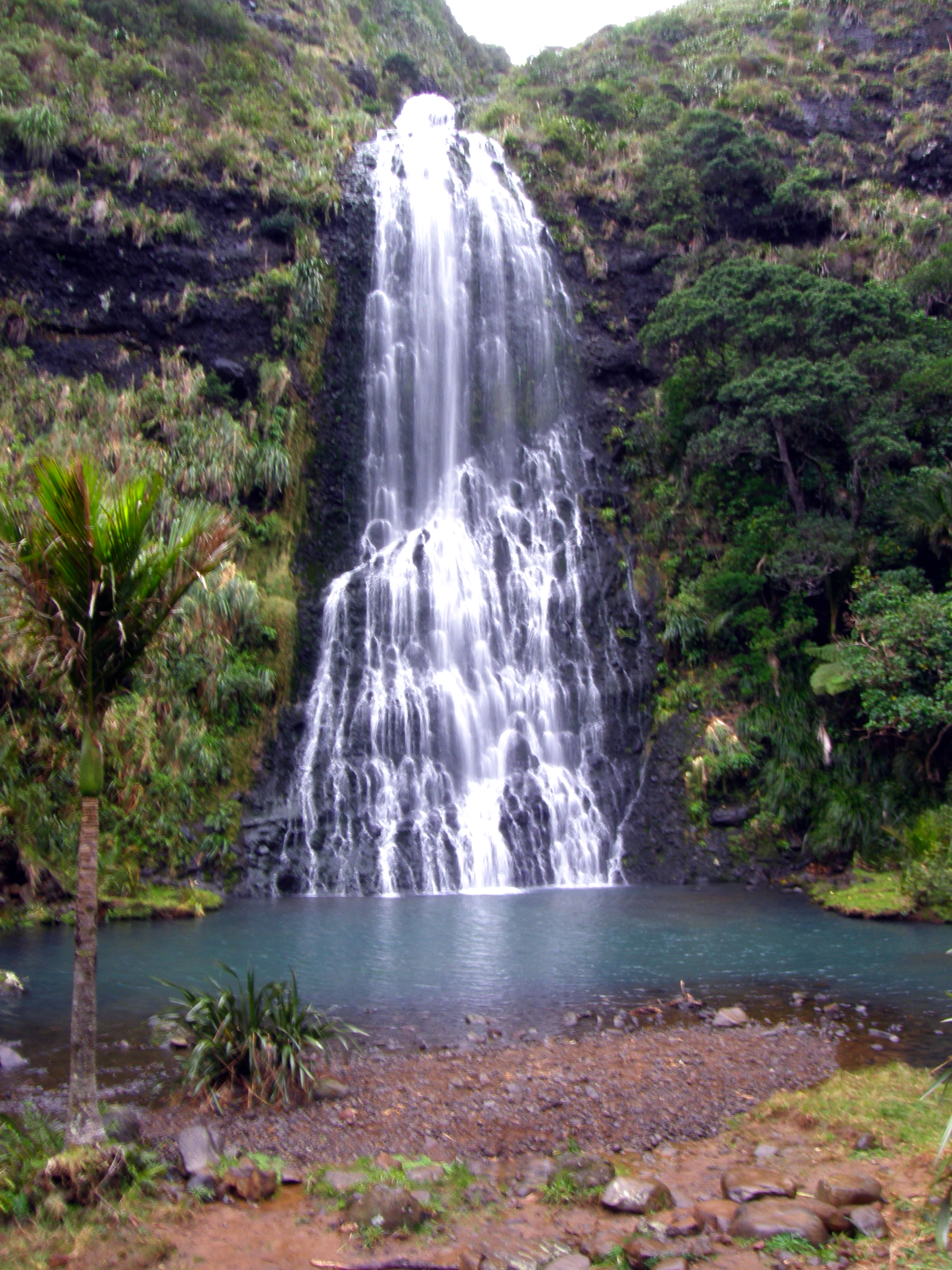 Karekare Falls at Karekare, New Zealand